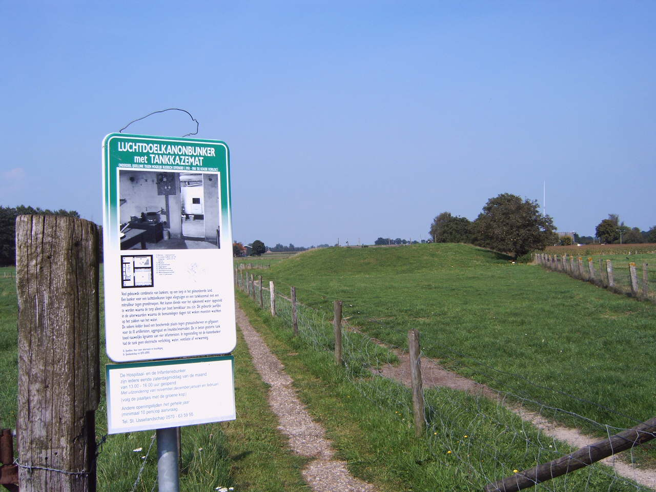 Bunker IJssellinie. In verband met leesbaarheid tekst op bord toestemming gevraagd en verkregen van de heer De Jong, rentmeester Stichting IJssellandschap.